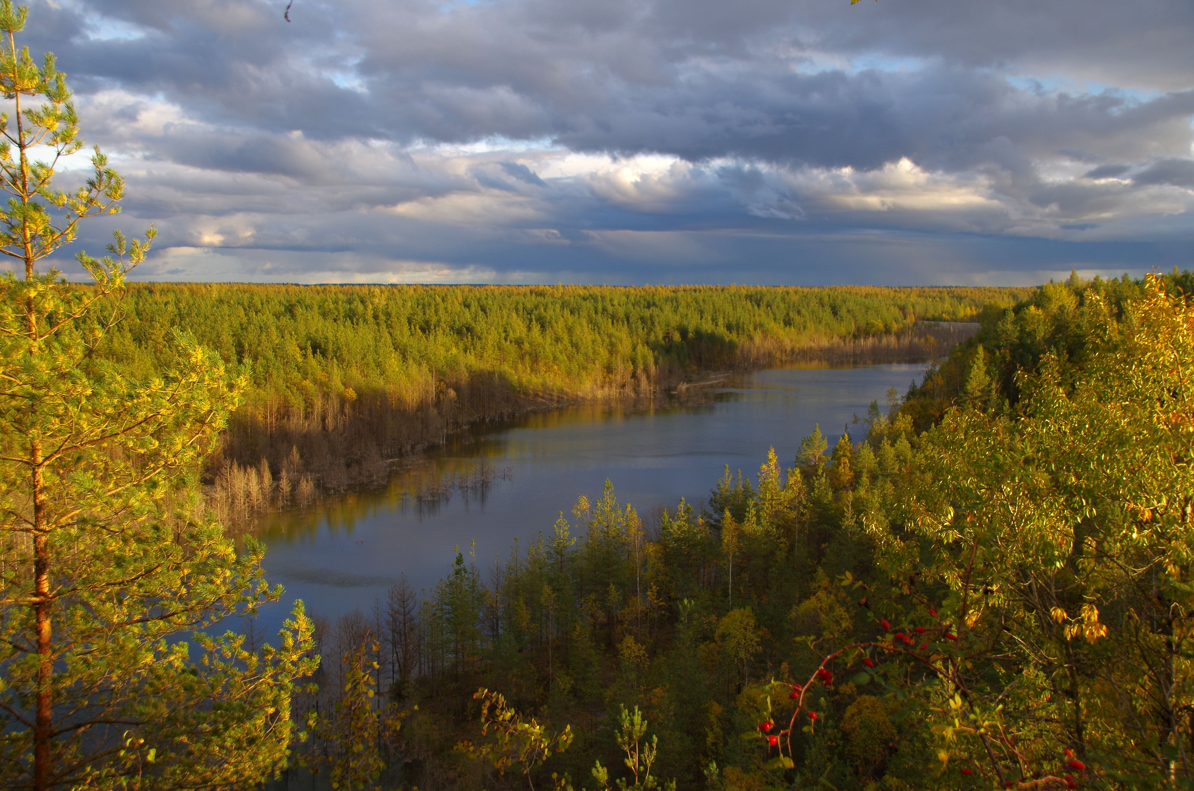 Aidu karjäär on Eesti Energia tütarettevõttele Enefit Kaevandused AS kuuluv 1974. aastal tööd alustanud ja 2012. aastal suletud pealmaakaevandus.Karjäär asub Ida-Viru maakonnas Lüganuse vallas Aidu külas.